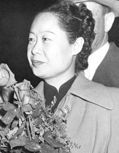 中文（香港）: 李宗仁夫人郭德潔肖像